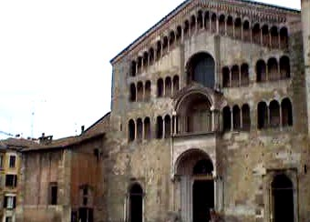 Den Doum vu Parma